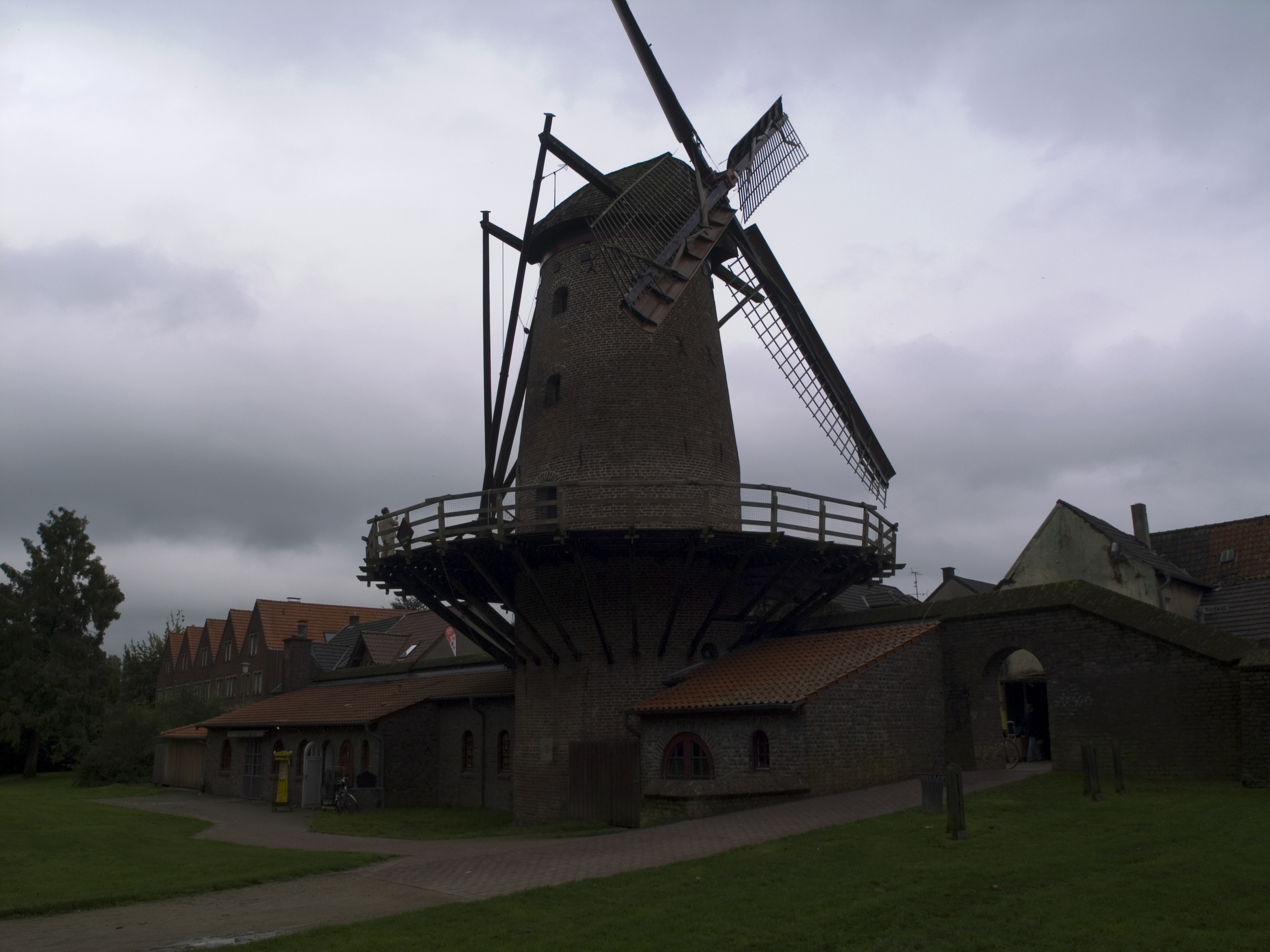 Северный Рейн - Вестфалия, Ксантен - мельница Kriemhildmühle